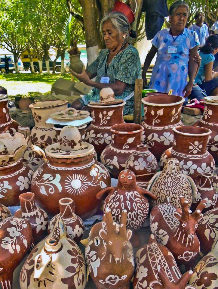 Artesanas de la comunidad de San Cristobal.